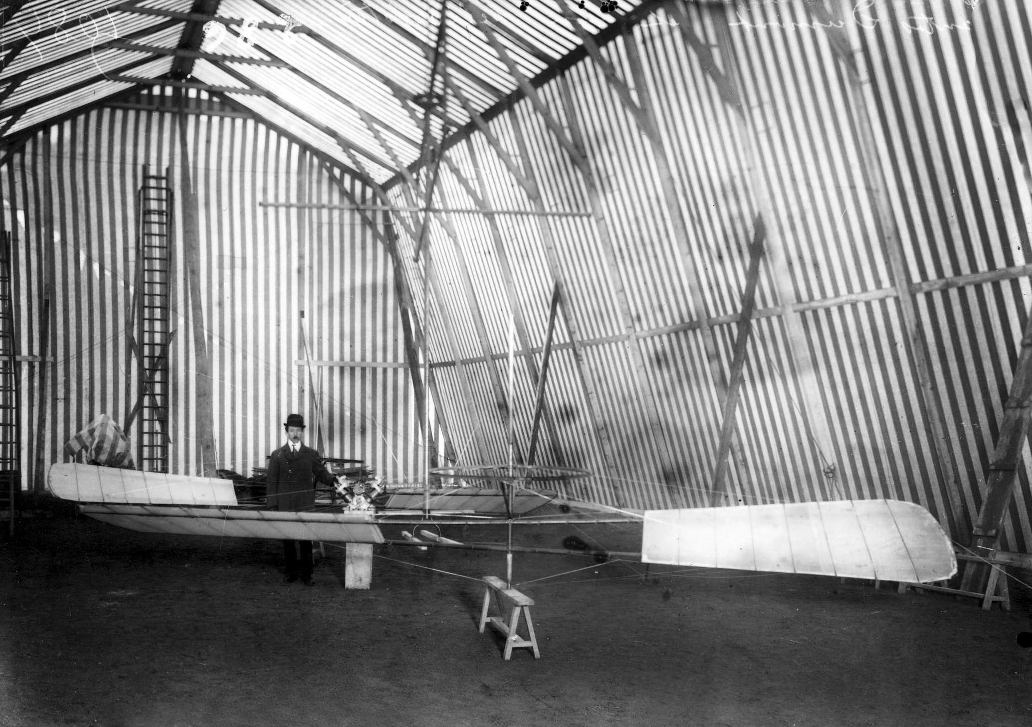 Alberto Santos Dumont avec son hélicoptère (Santos-Dumont no 12, construit 1905/1906) dans le hangar construit en 1901 pour tester ses dirigeables. Hangar à structure légère et économique faite de poteaux en bois, consolidés par des câbles d'acier, recouverts d'une épaisse toile à rayures rouge et blanche, montée entre la rue de Longchamp et le Boulevard du Général-Koenig (plaque au no 85), Neuilly-sur-Seine, France.